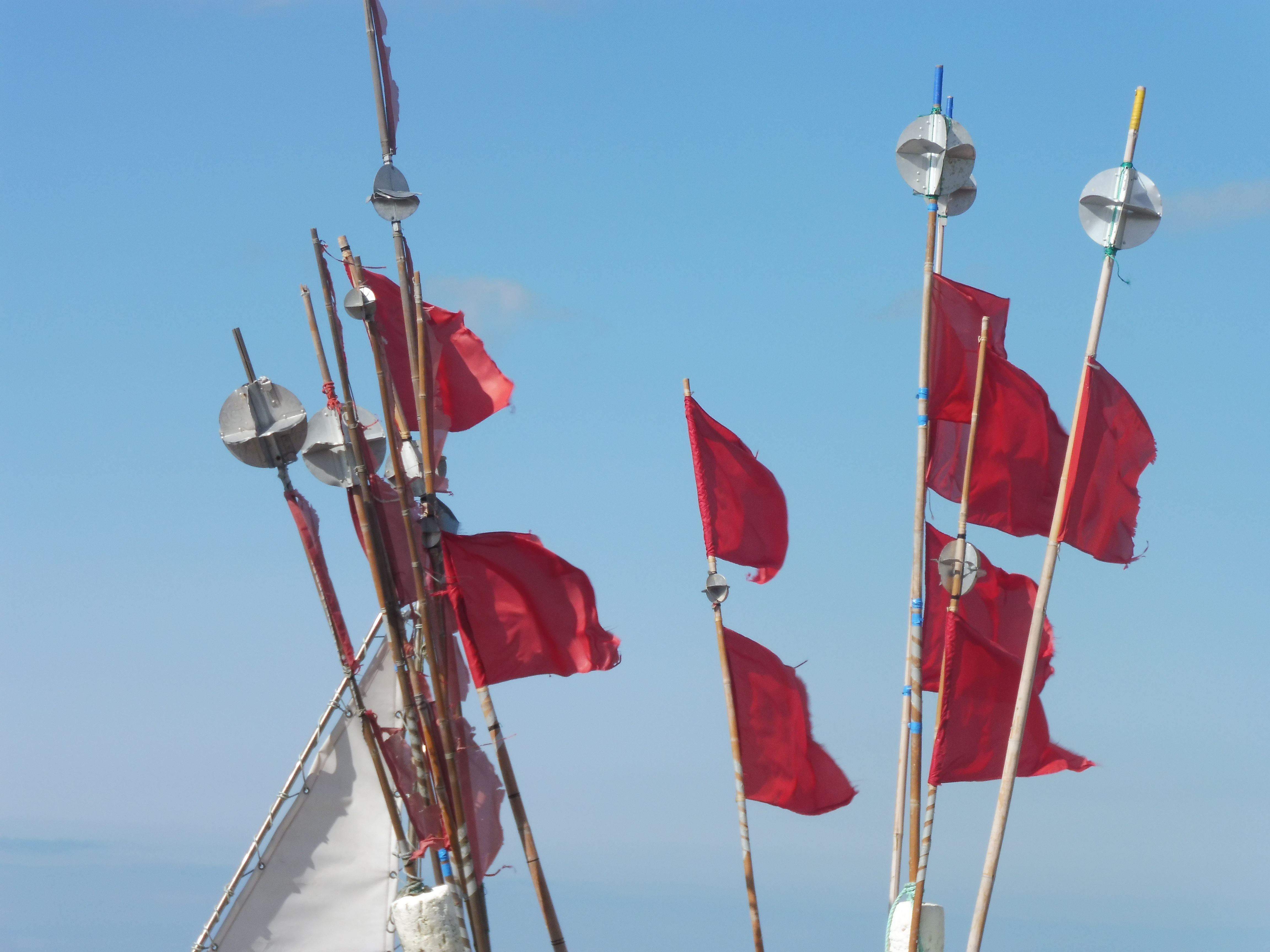 Stangen mit Flaggen und Radarreflektoren zur Markierung von Stellnetzen. Gebräuchlich sind sie in der Küsten- und Boddenfischerei der Ostsee.